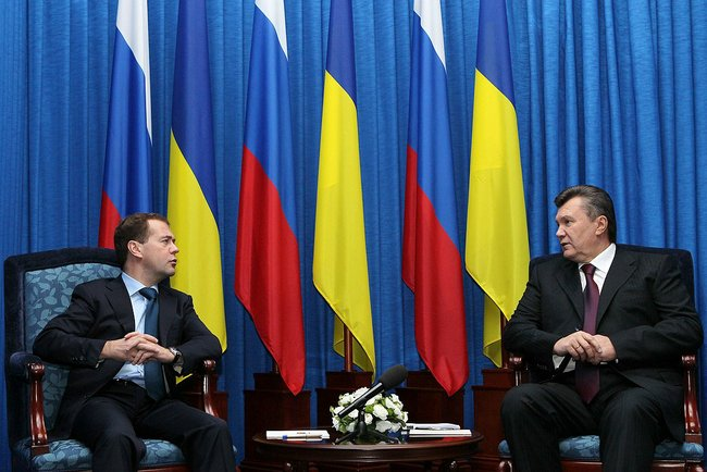 С Президентом Украины Виктором Януковичем.